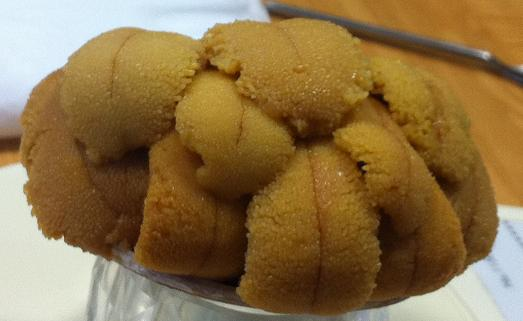 uninokaiyaki